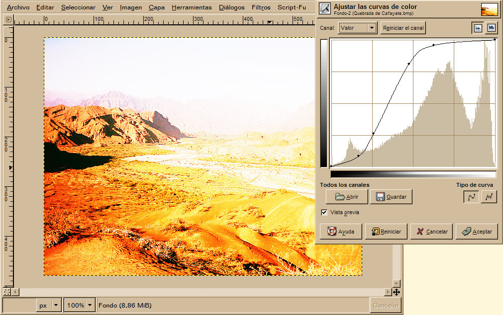 Ejemplo de curva de color en Gimp.